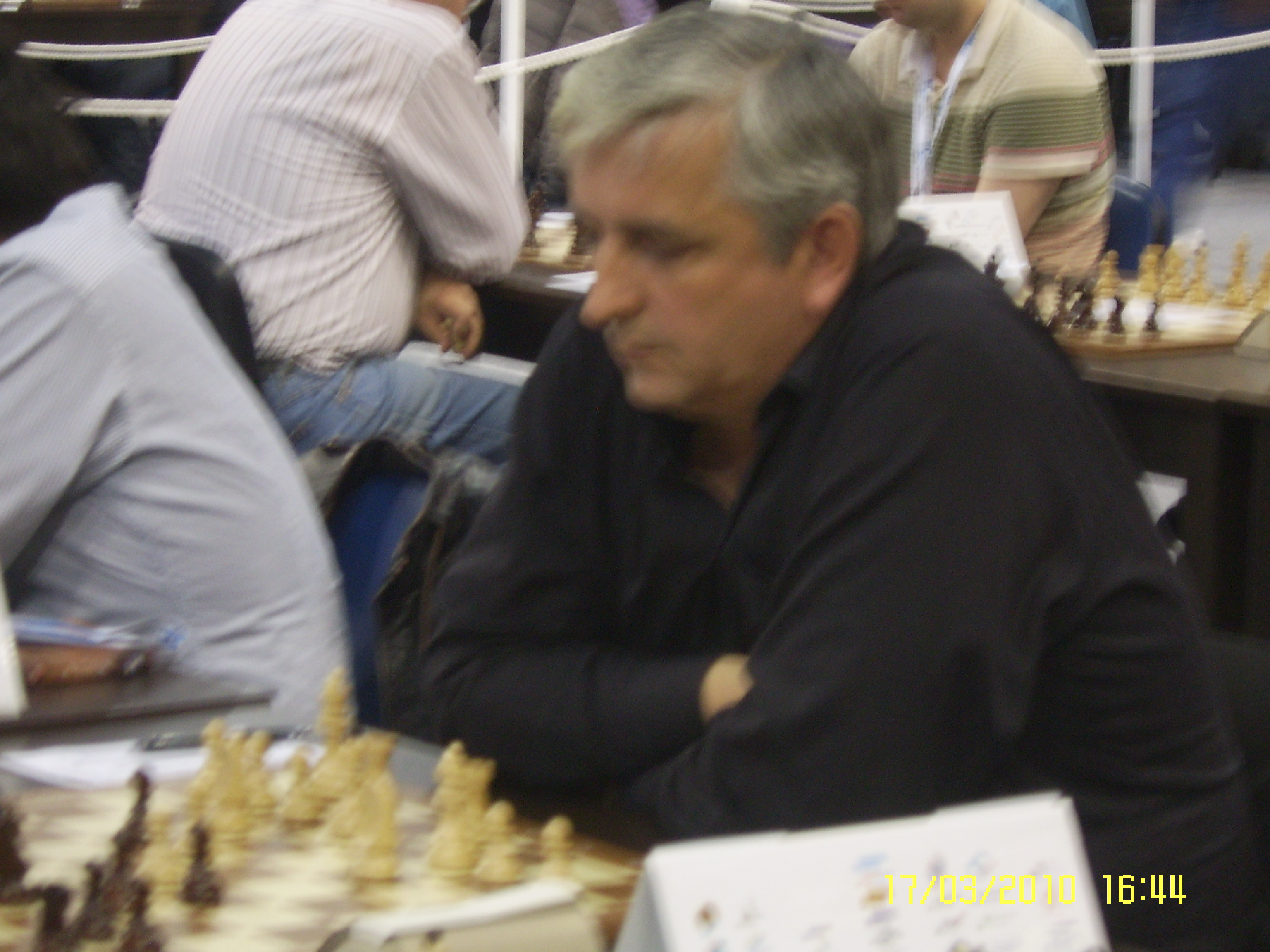 Hrvatski velemajstor Zdenko Kožul na 11. Europskom pojedinačnom prvenstvu u šahu za muškarce i žene 2010. g. u Rijeci